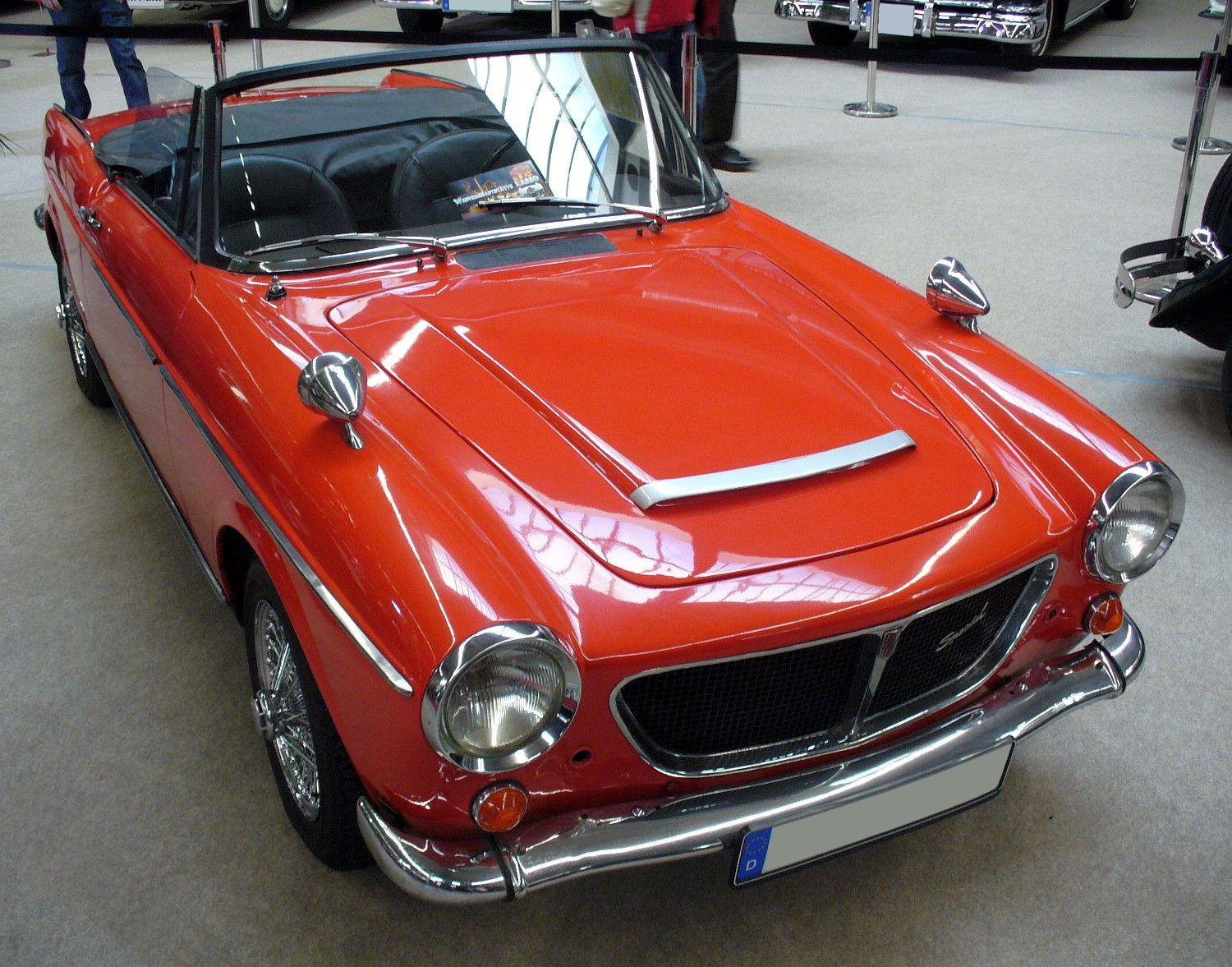 Fiat 1200 Cabrio